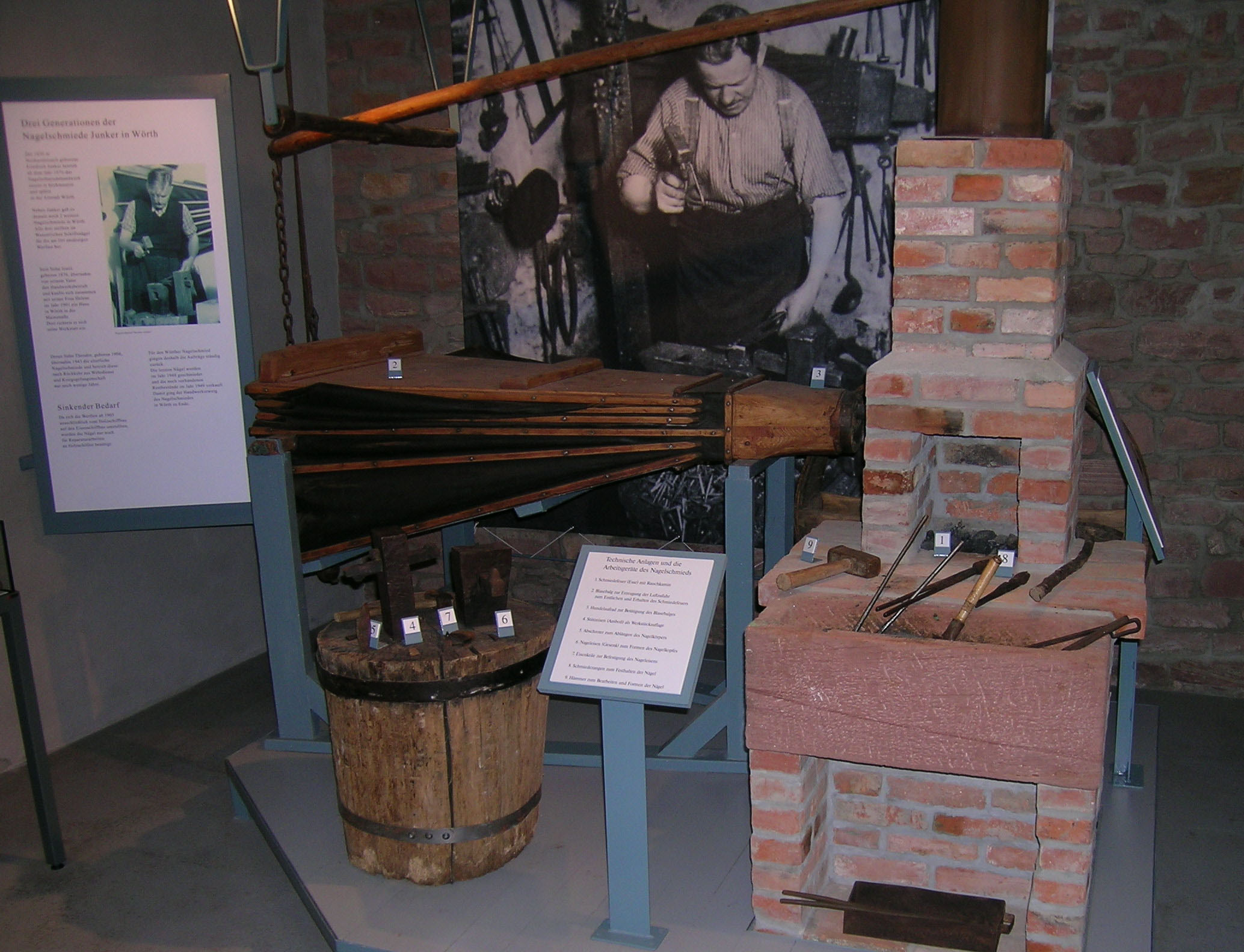 Schifffahrts- und Schiffbaumuseum Wörth am Main (Nebenausstellung Nagelschmiede)